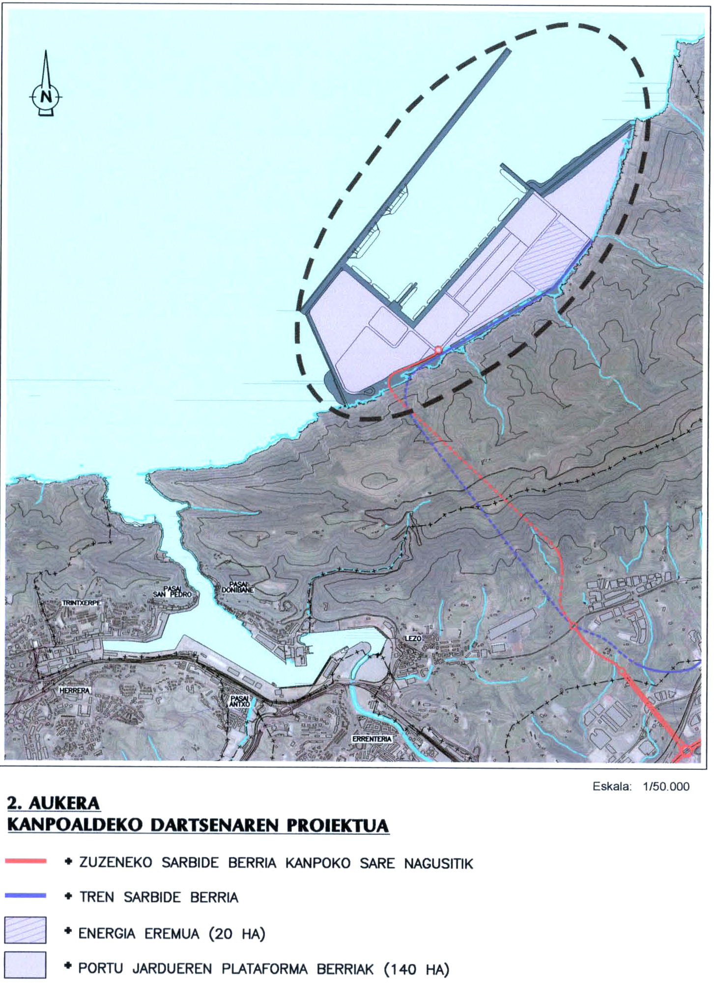 Pasaiako kanpo-porturako 2010eko urtarrileko bertsio bat.